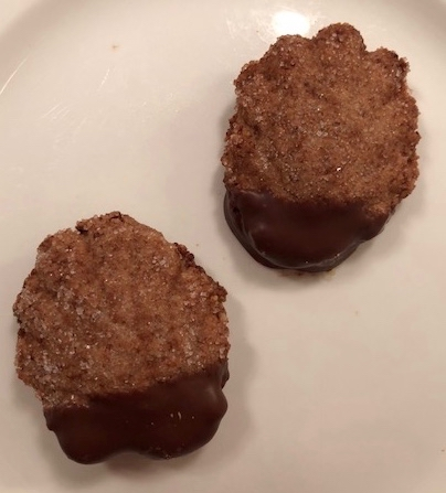 Bärentatzen ein Weihnachtsgebäck